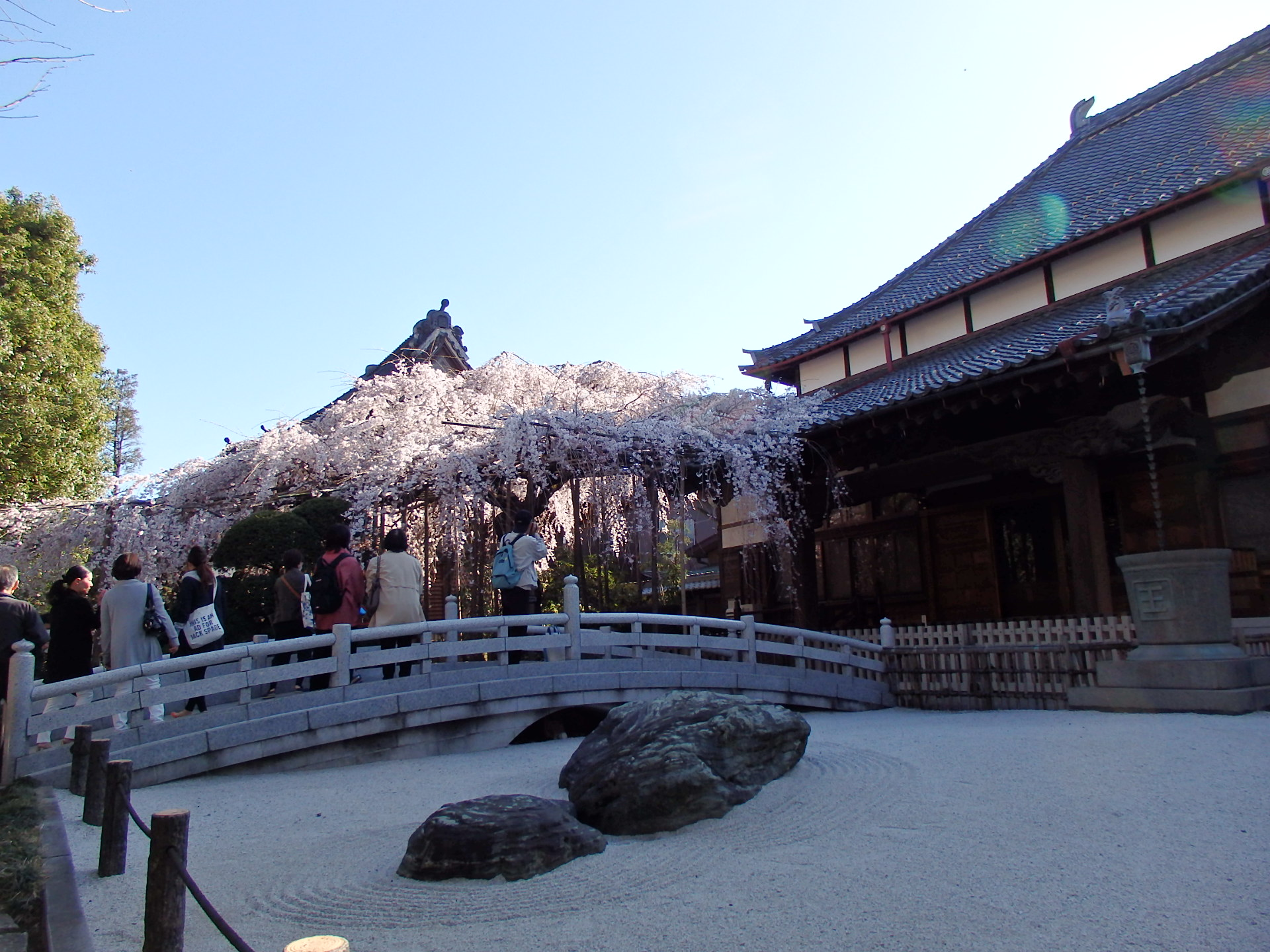 春の浦和玉蔵院